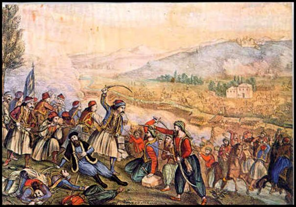 Πίνακας του Αλέξανδρου Ησαΐα εμπνευσμένος από τη μάχη της Αλαμάνας